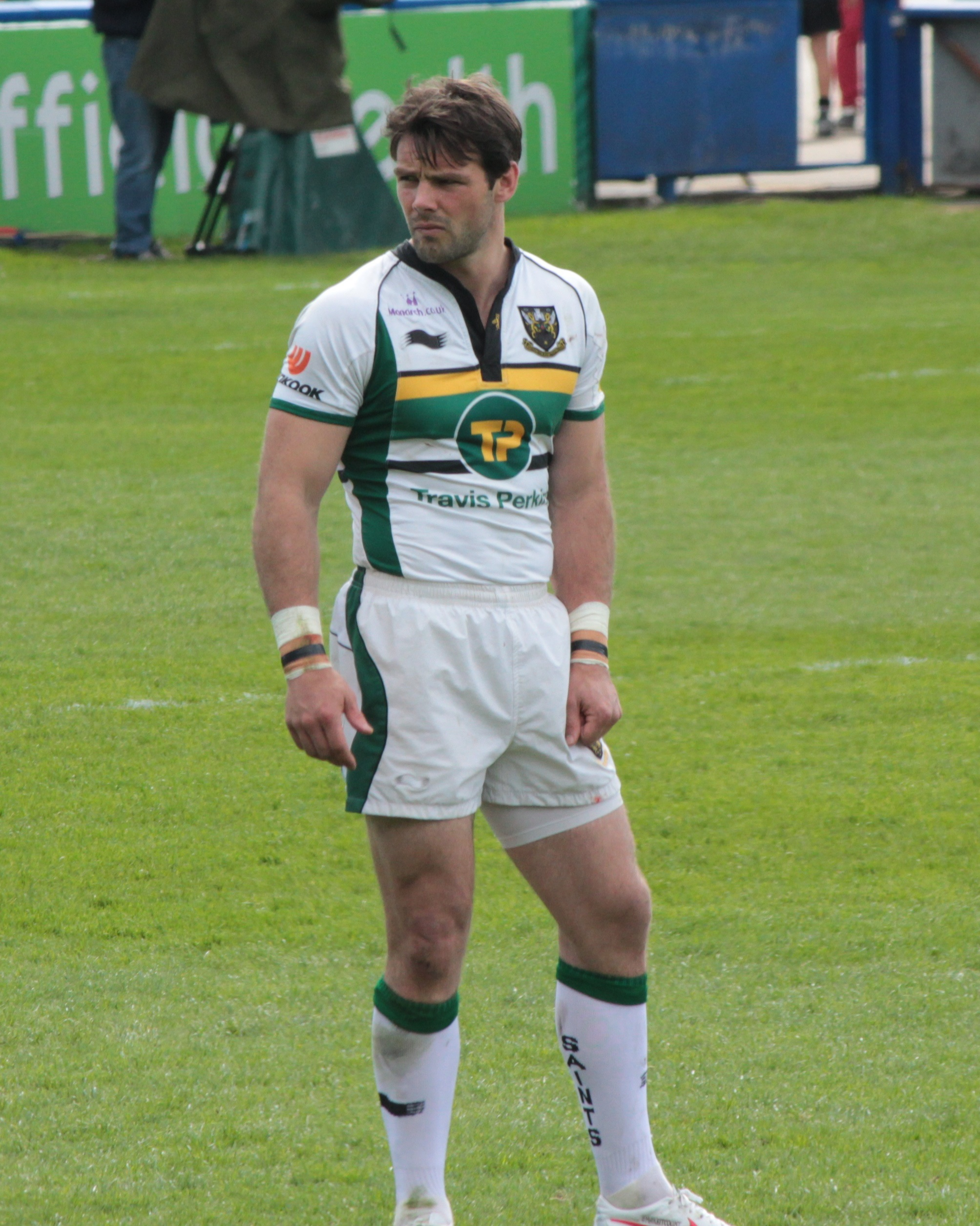 Ben Foden